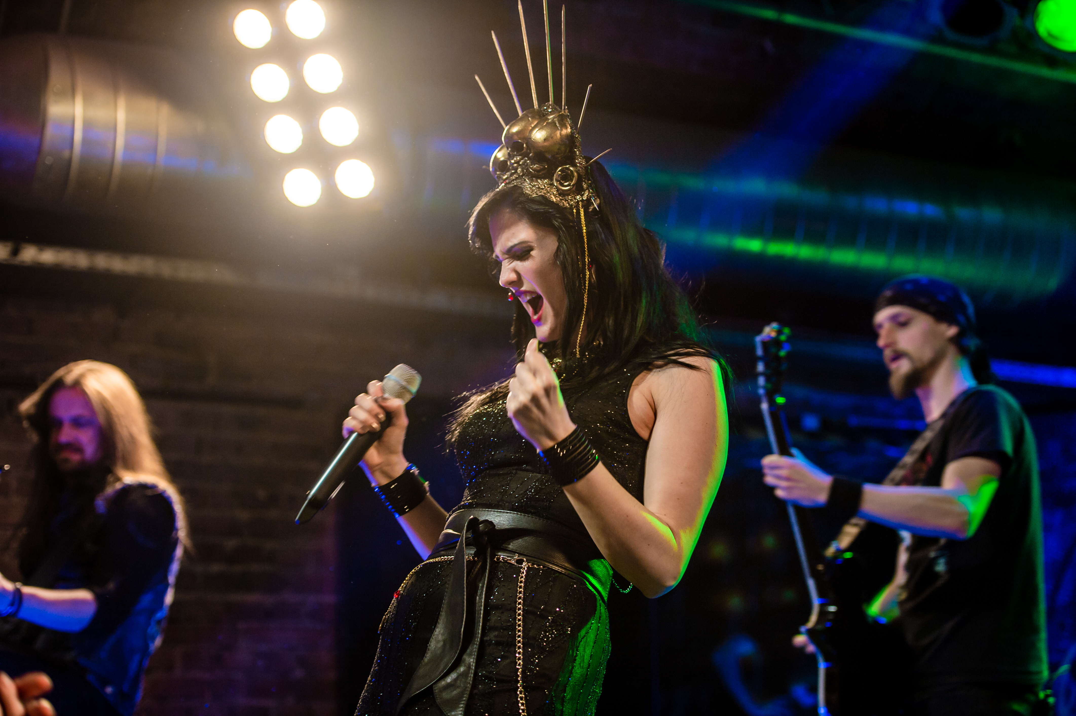 'Xandria 'Symphonic Metal Nights' Tour - Bochum Matrix'